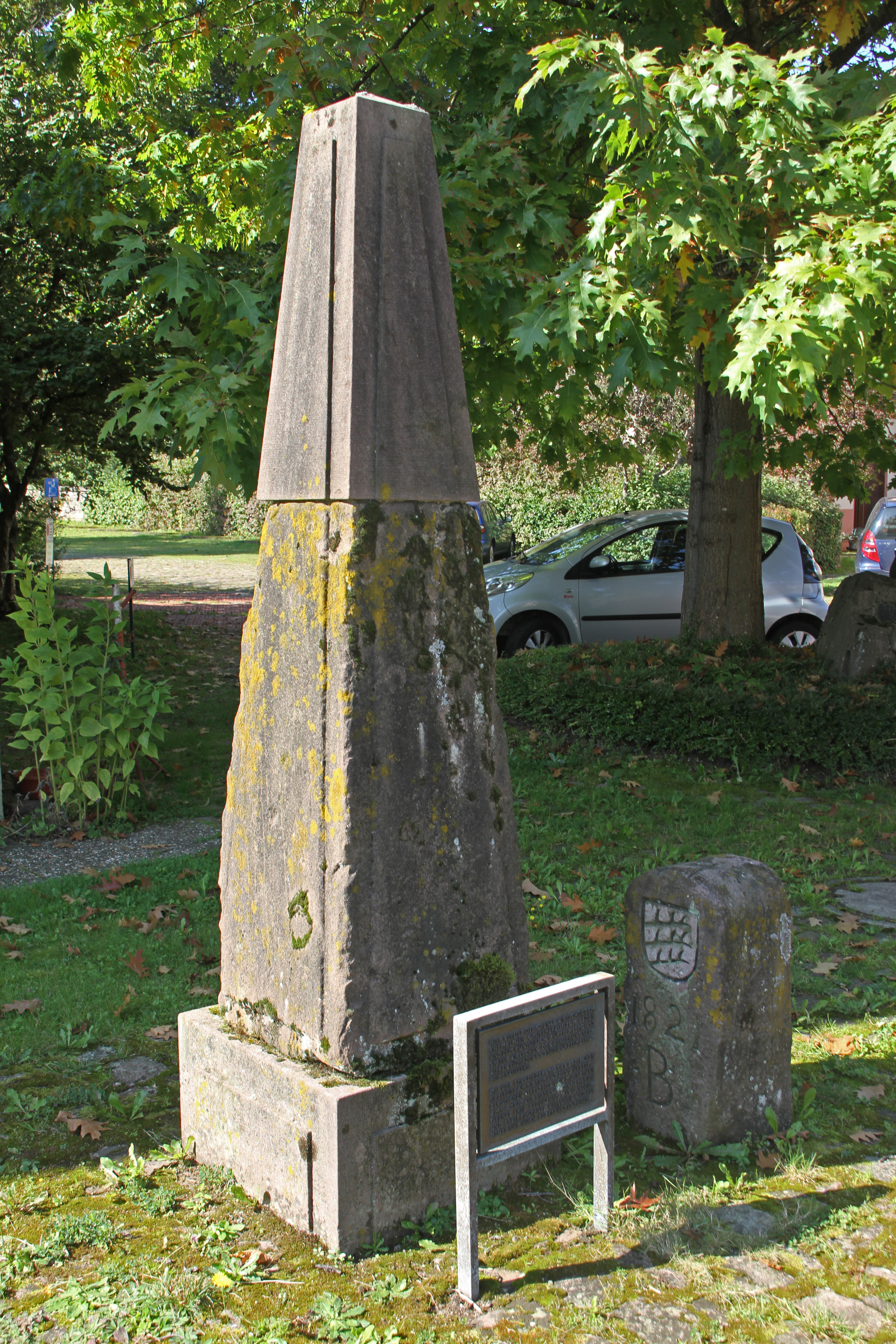 Grenzstein in Moosbronn. Grenze zwischen ehemaligem Großherzogtum Baden und Königreich Württemberg.